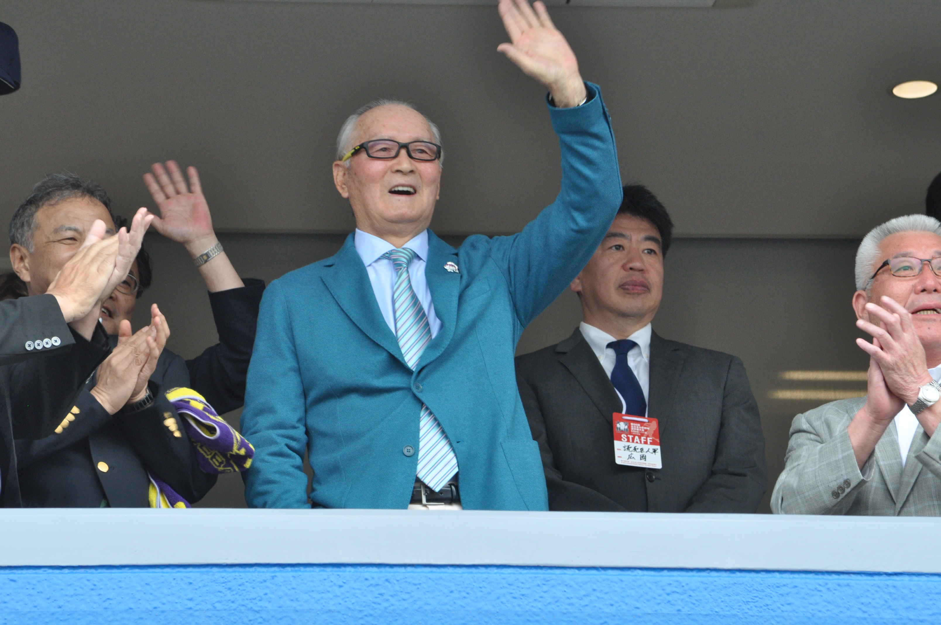 立教大学硬式野球部